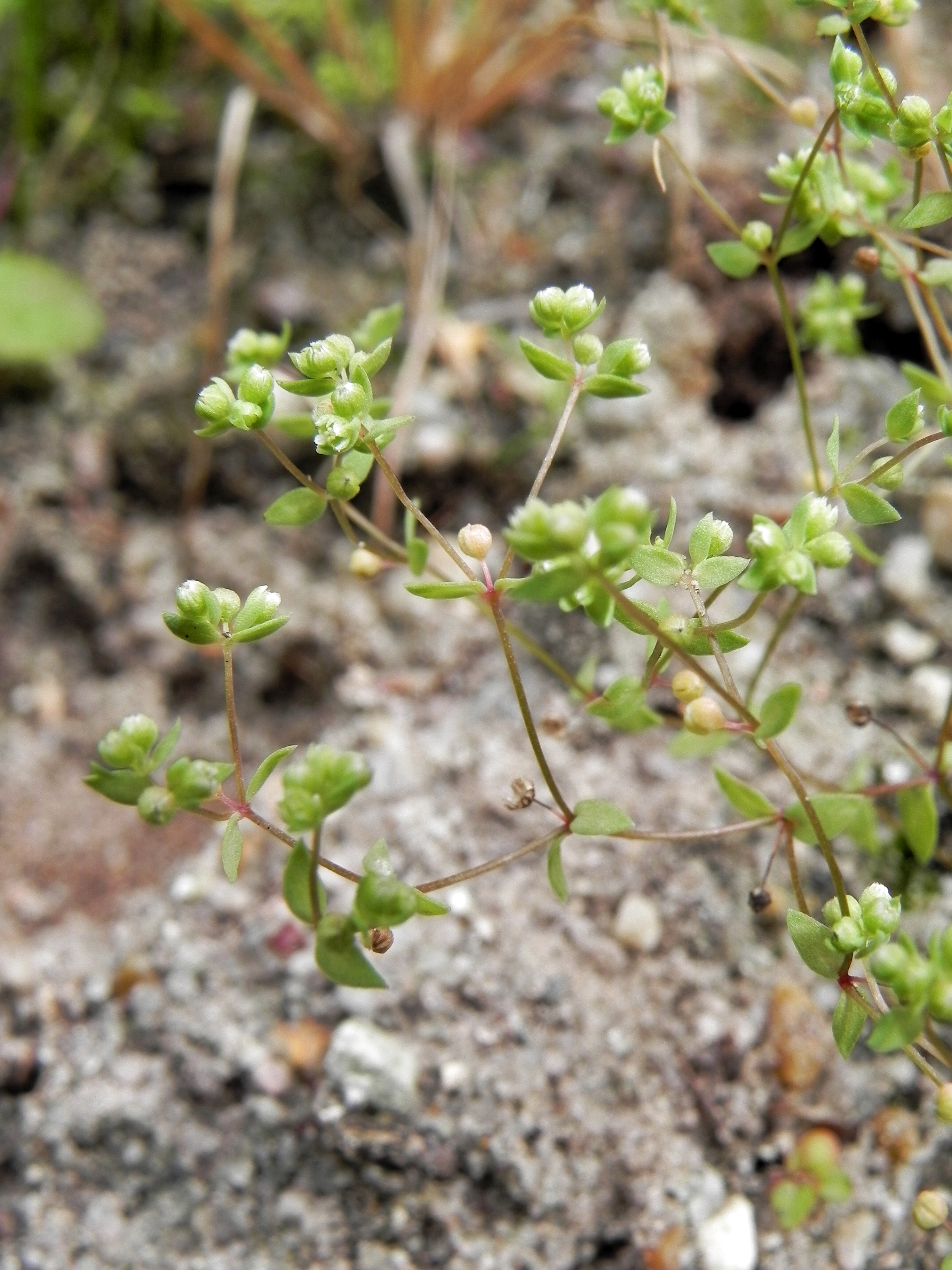 Zwerglein (radiola linoides) im Naturpark Südheide (Germany)